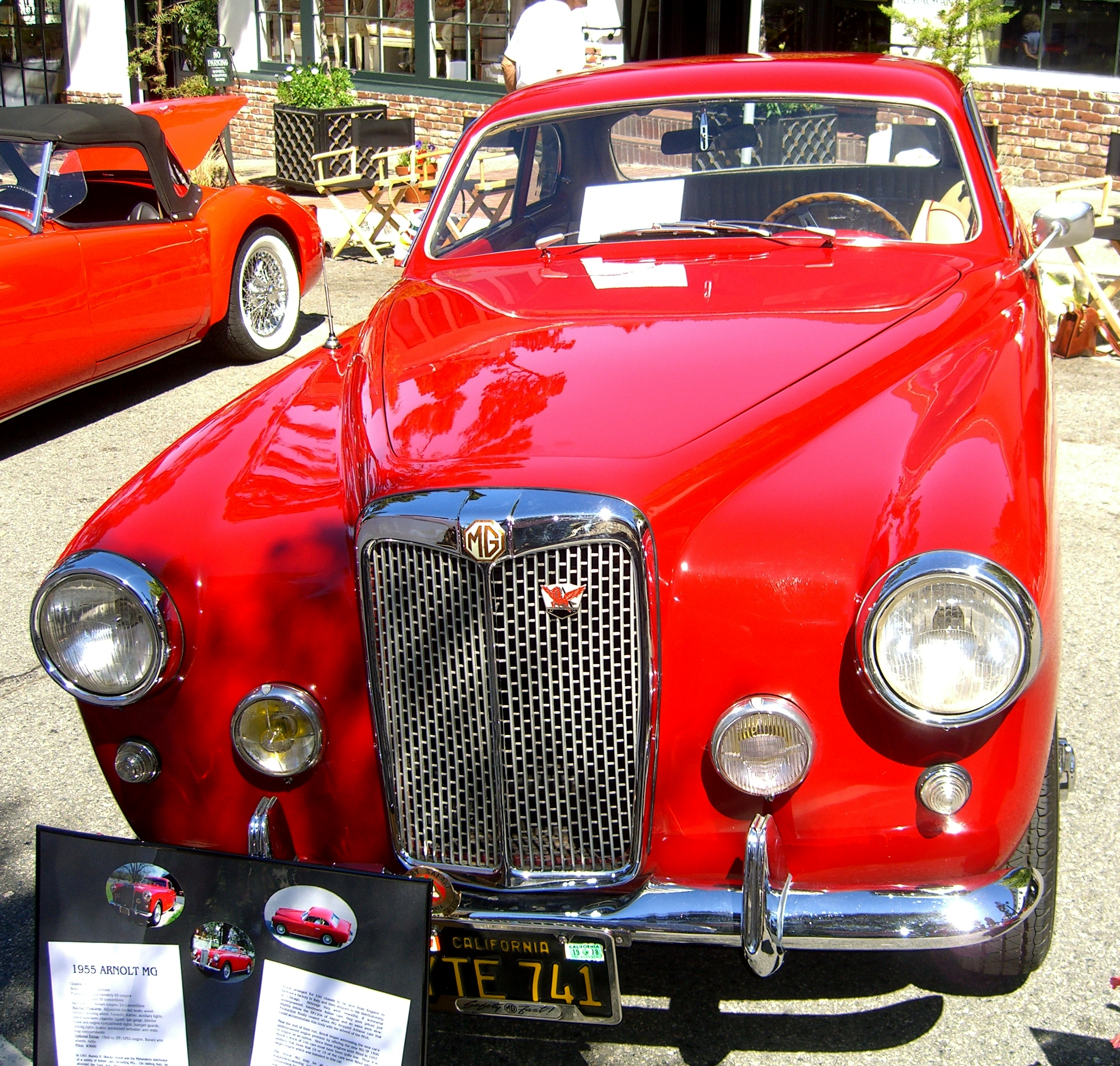 Arnolt-MG